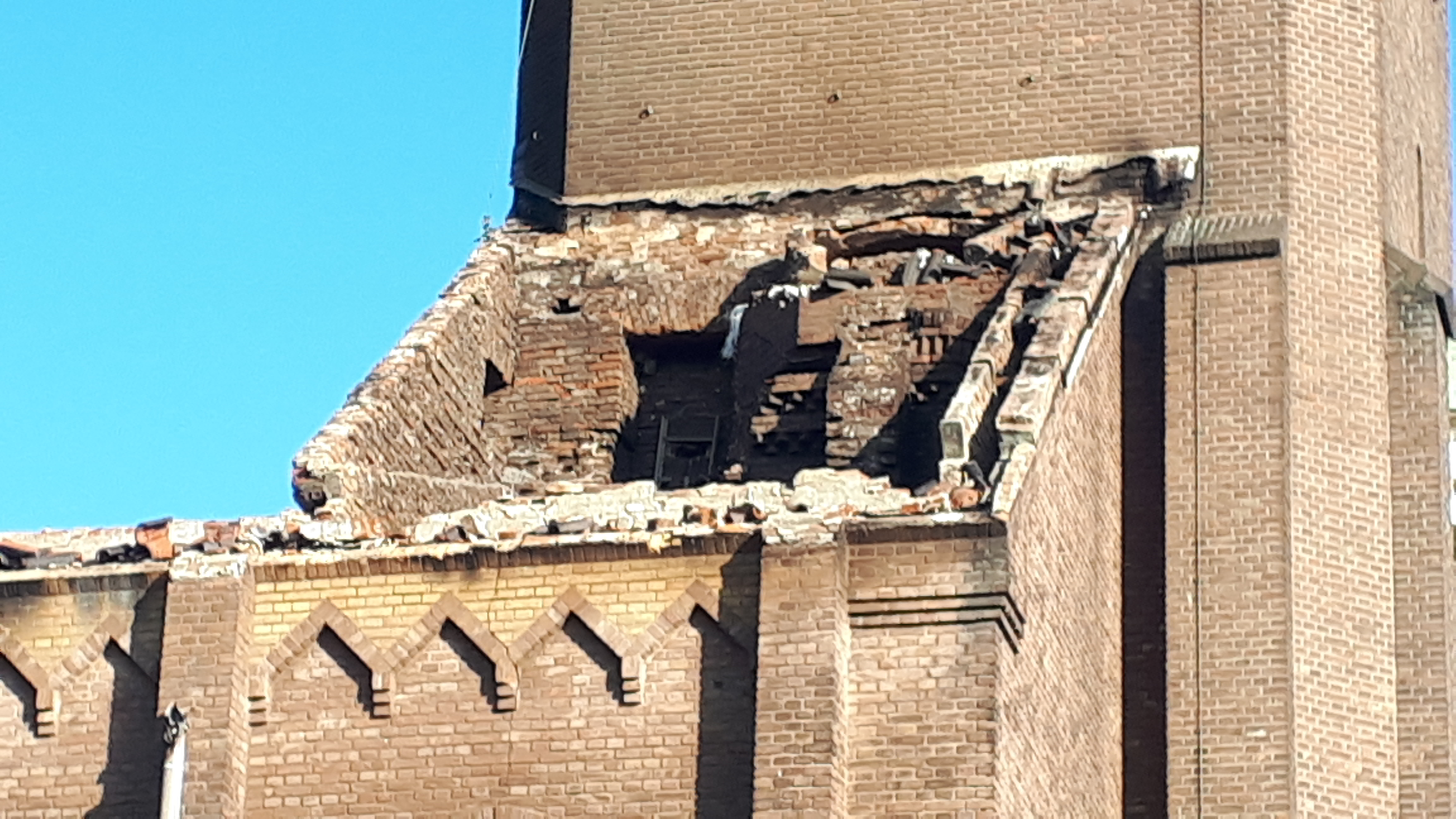 Na de brand van 2019: Onze-Lieve-Vrouw-Geboortekerk uit 1931 met detail van de vorige kerk. In 1931 werd de toren uit 1977 ommanteld, maar na de brand kwam hier en daar het metselwerk van de oorspronkelijke kerk weer aan het licht.